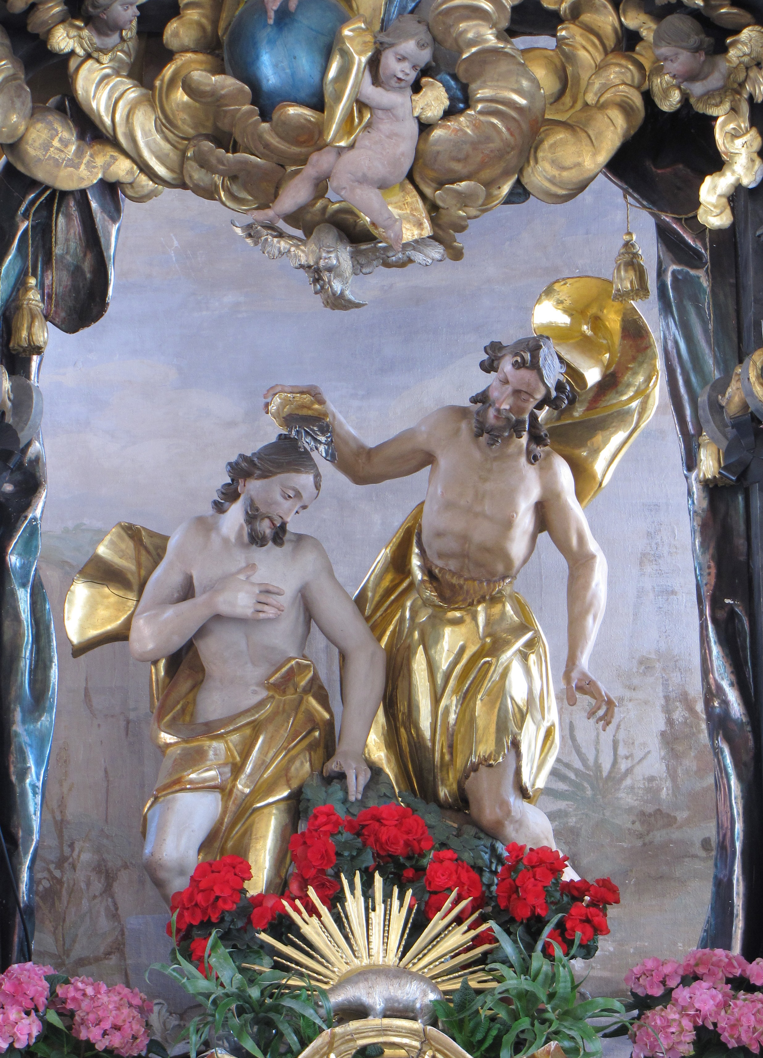 Taufgruppe von Johann Richard Eberhart im Hochaltar der Pfarrkirche von Bernbach, 1776